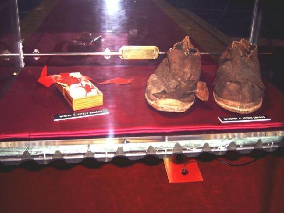 Eigen foto, "om niet" afgestaan tbv. Wikipedia